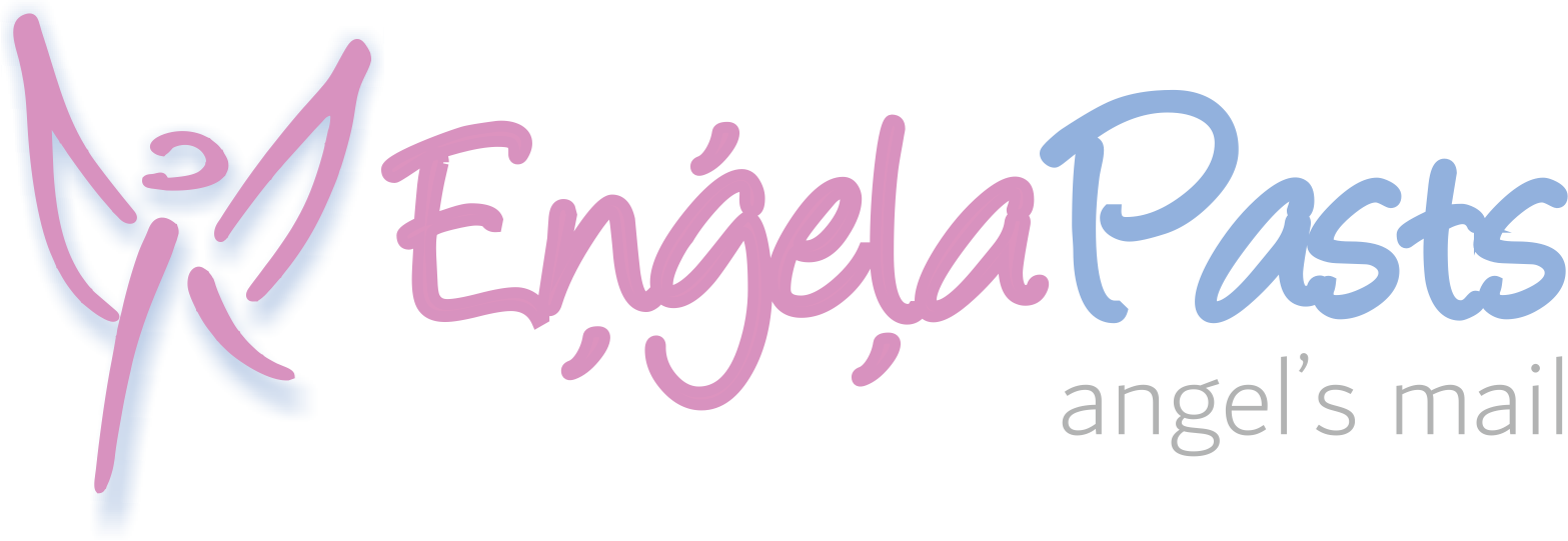 Eņģeļa pasts logo